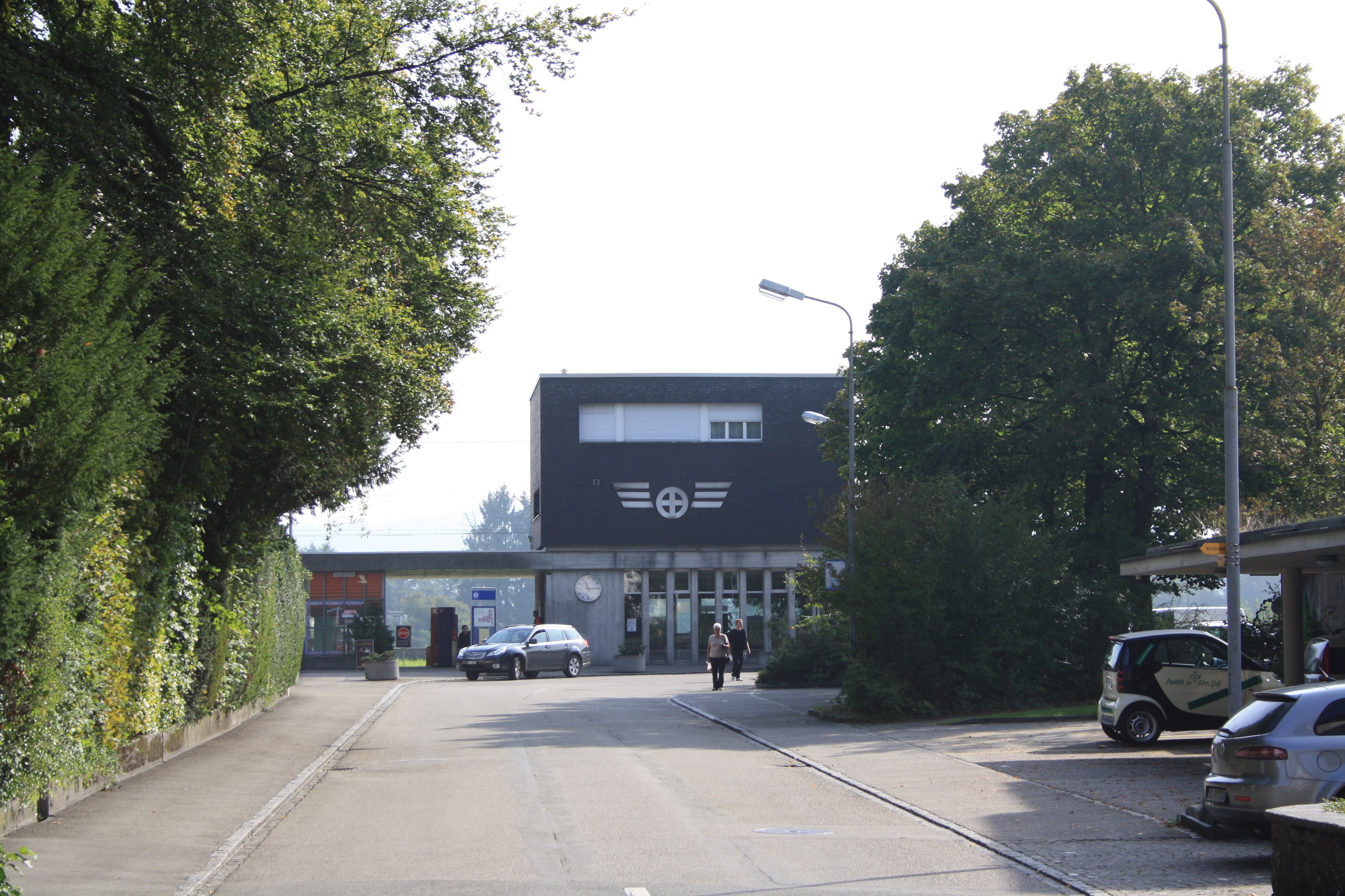 Bahnhof Kölliken